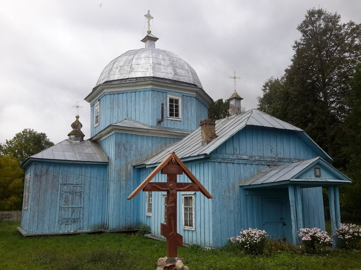 Вялікія Лазіцы. Свята-Пакроўская царква